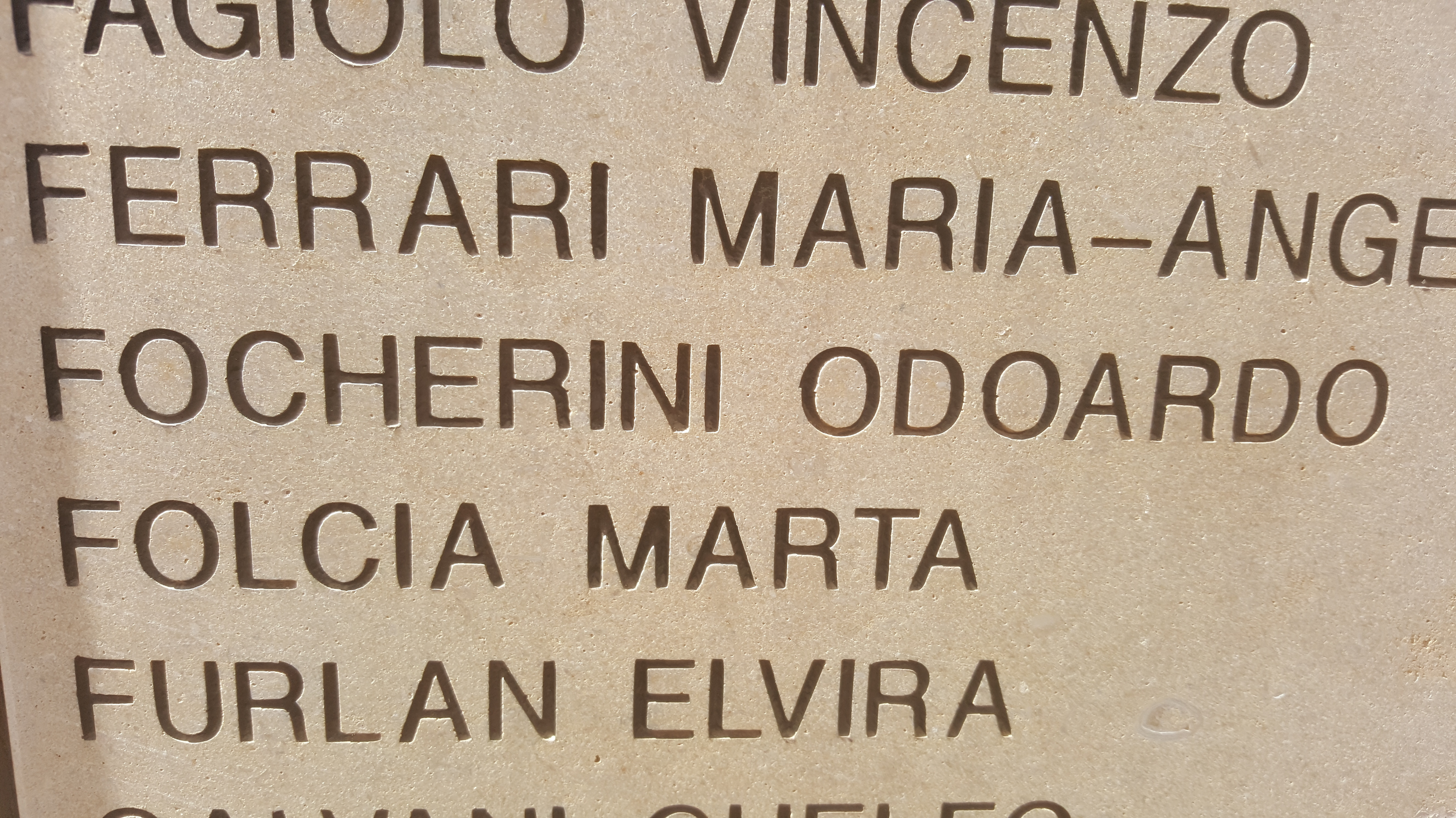 שמו של פוקריני על קיר חסידי אומות עולם איטלקים ביד ושם